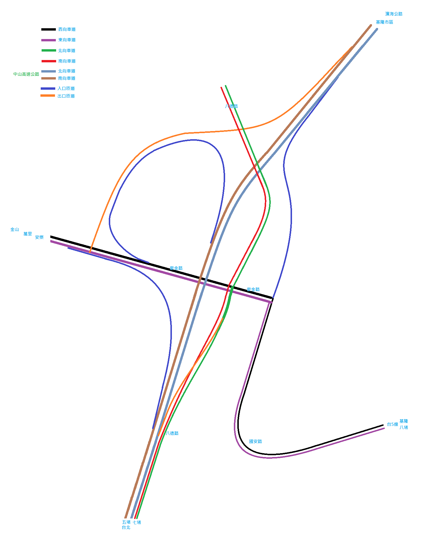 中文（台灣）: 國道一號中山高基隆交流道示意圖